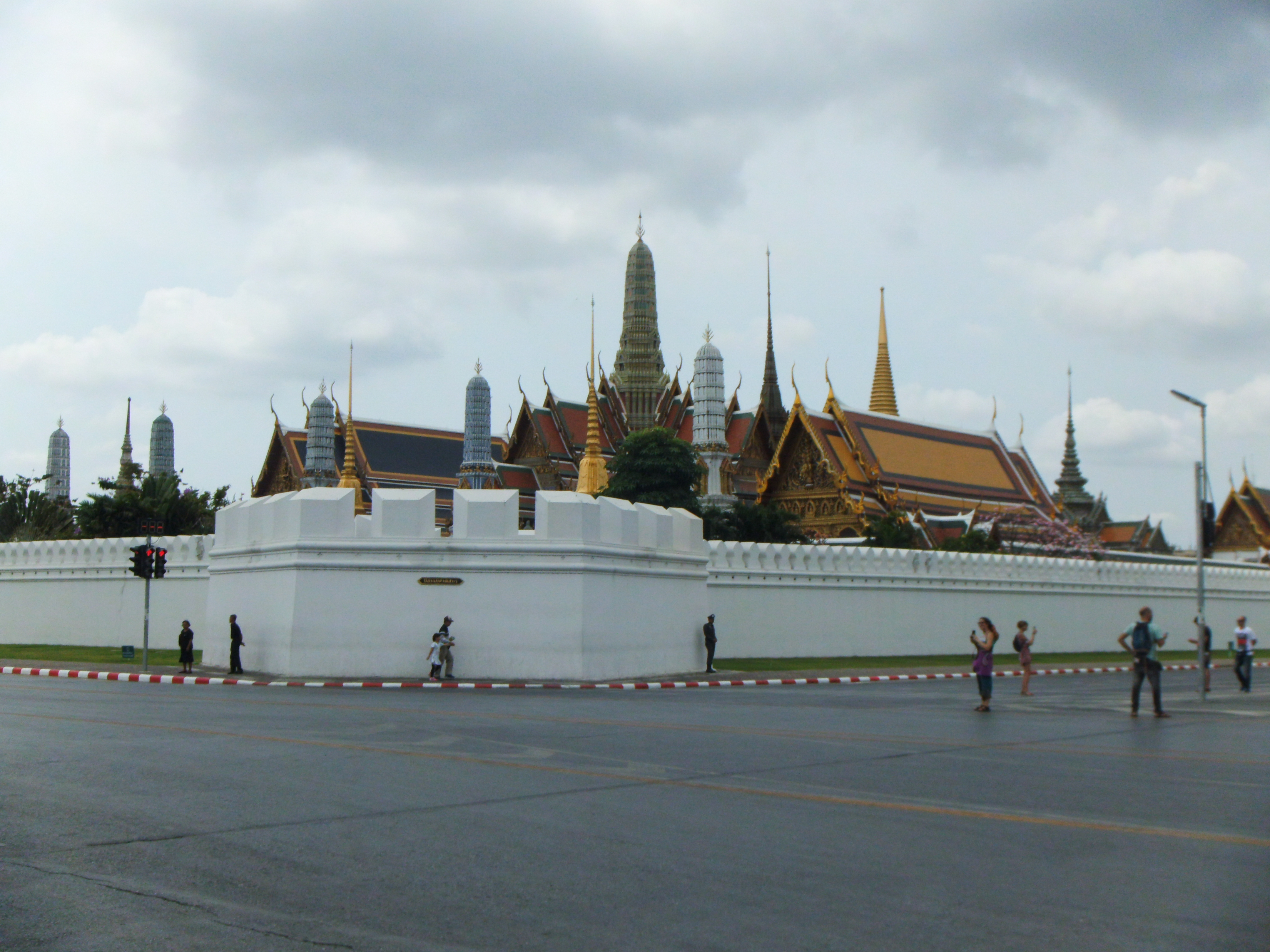 พระบรมมหาราชวังและวัดพระศรีรัตนศาสดาราม